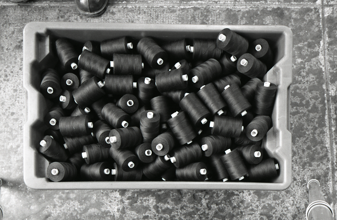 Servizio fotografico : Milano, 1980 / Paolo Monti. - Strisce: 6, Fotogrammi complessivi: 28 : Negativo b/n, gelatina bromuro d'argento/ pellicola ; 35 mm. - ((Sul portanegativi: [NIKMAT? FP4]. - La serie è identificata da Monti con segni grafici e distinta dalla successiva.